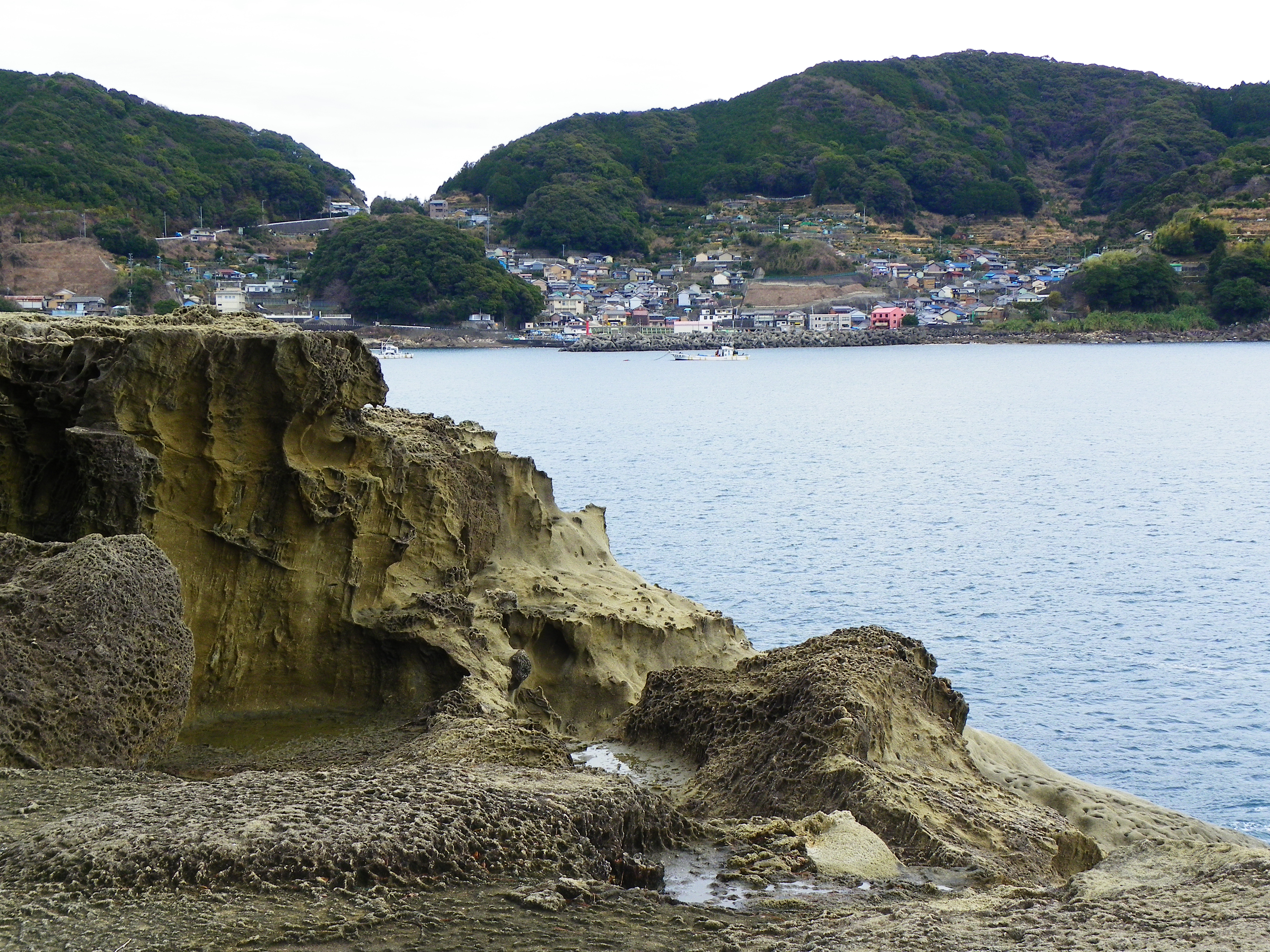 三重県熊野市鬼ヶ城の海岸。